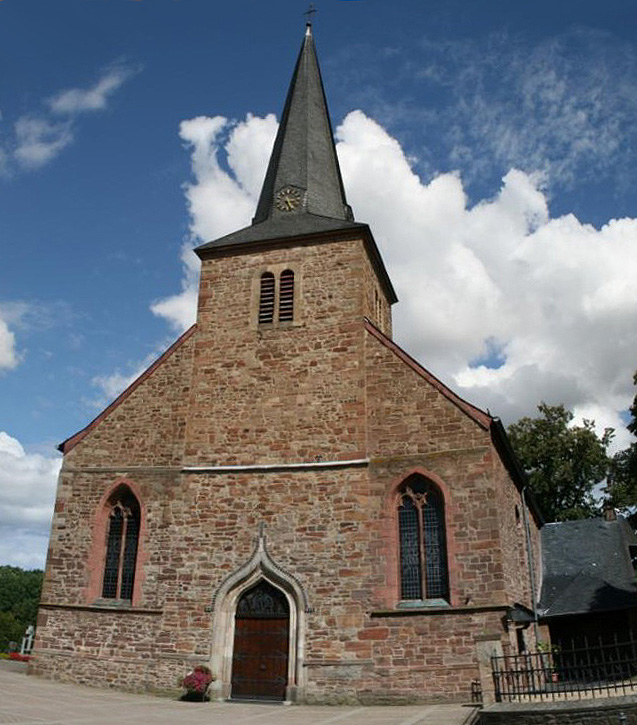 Kirche in Drove. Bild ist aus 2 Aufnahmen zusammengesetzt.